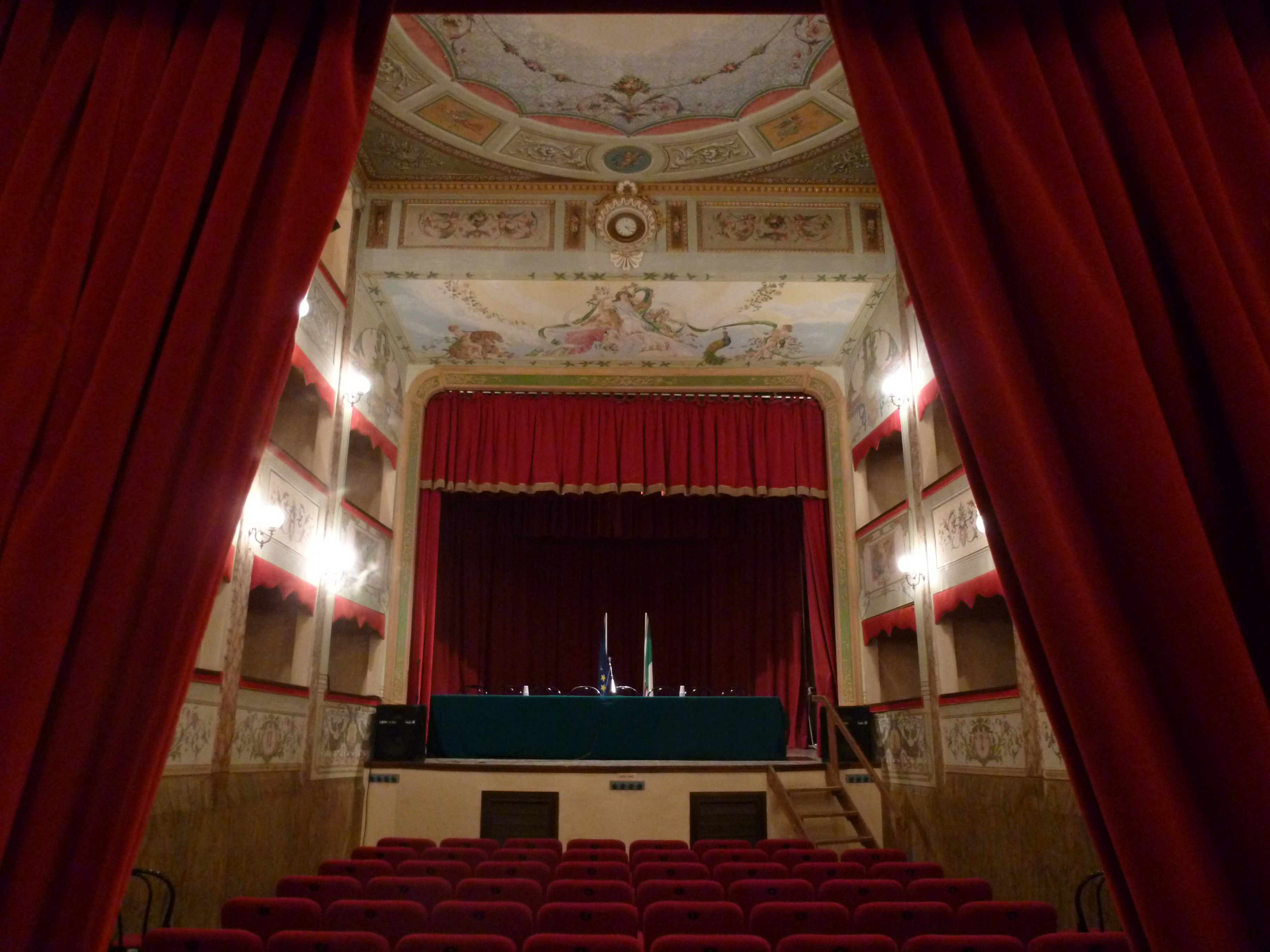 Teatro Mario Tiberini This is a photo of a monument which is part of cultural heritage of Italy.